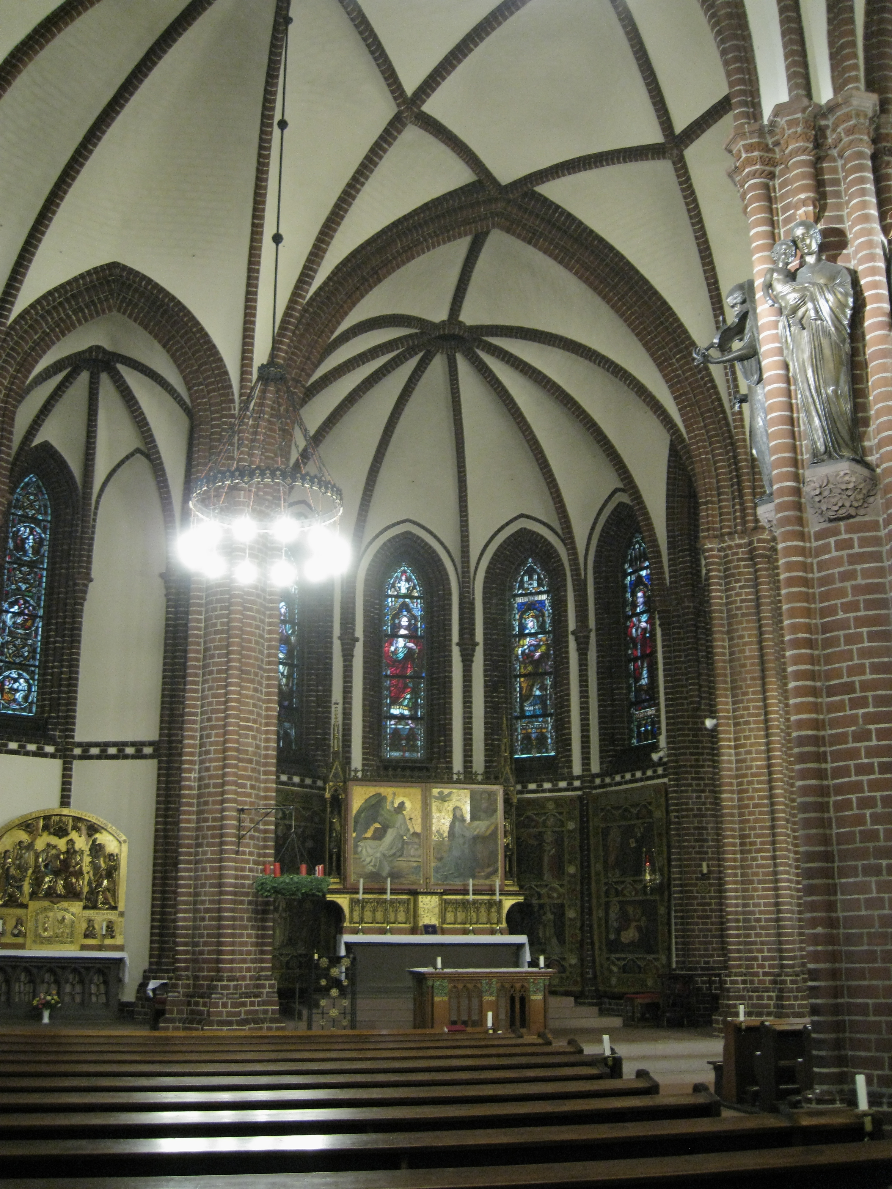 Blick auf geschlossenen Flügelaltar in der Mitte und Marienaltar links